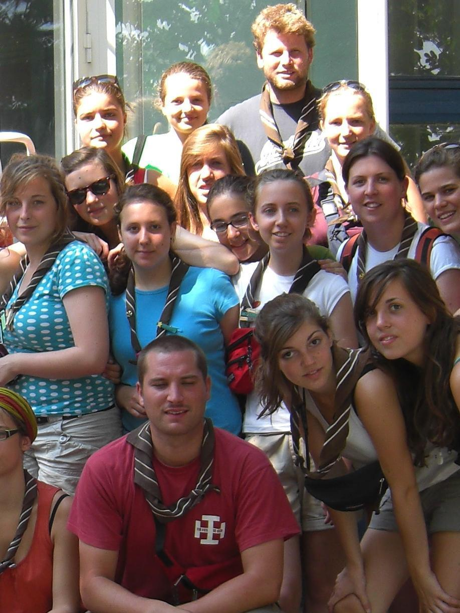 reprezentanţi ai rasei europoide